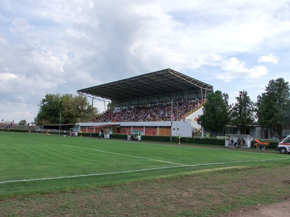 This is stadium in Pirot (Dragan Nikolić stadium) usted by FC Radnički Pirot during match against FC Zemun. Photo taken by me, I posted it earlier on some forum (SkyscraperCity on Serbian) and picture went viral.